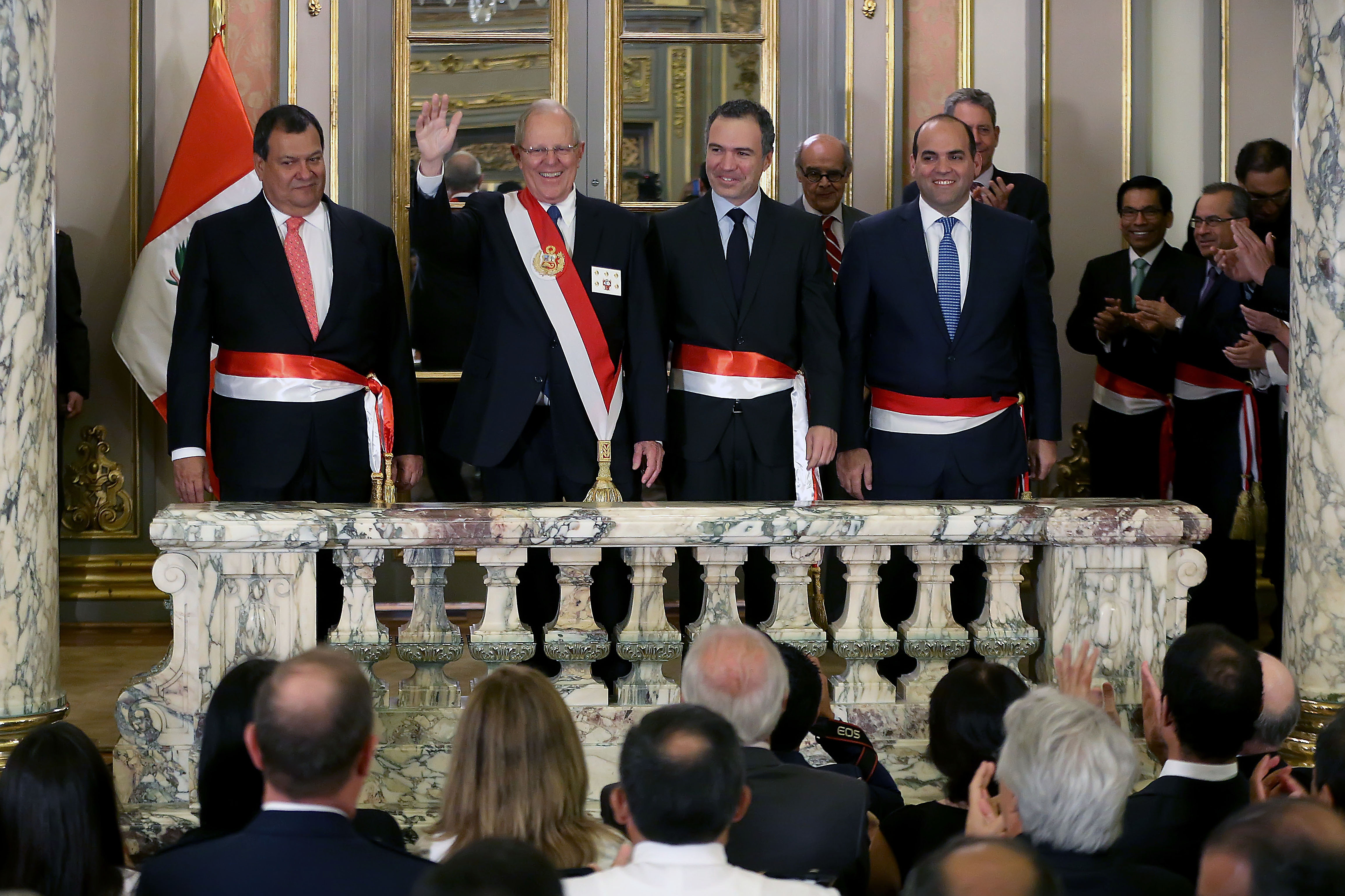 El señor Jorge Nieto Montesinos, Doctor en Ciencias Sociales, Magíster en Ciencia Política y Sociólogo, juramentó como ministro de Estado en el despacho de Defensa.